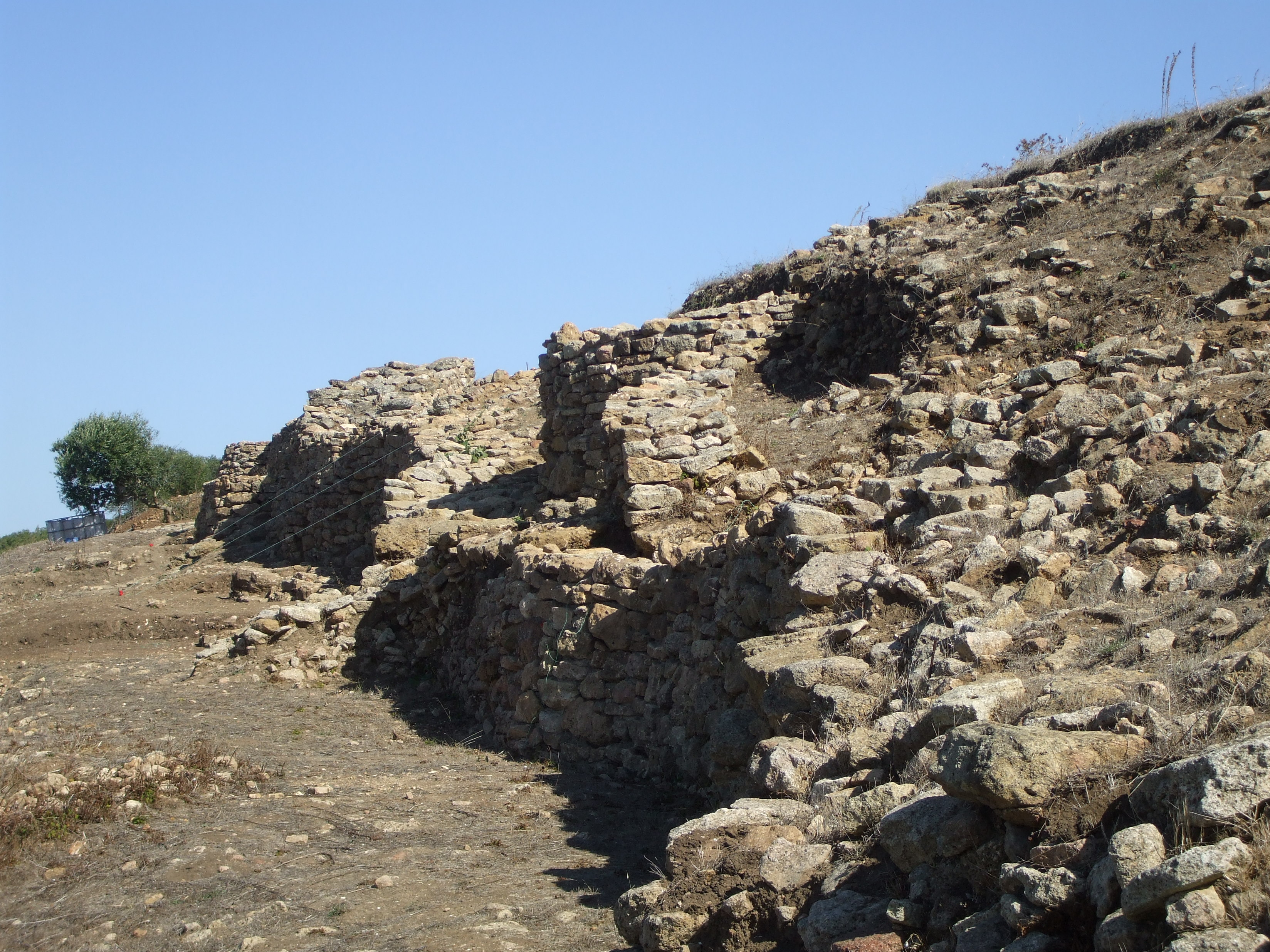 Foto ilustrativa da muralha do Castro de Chibanes vista da enconsta norte